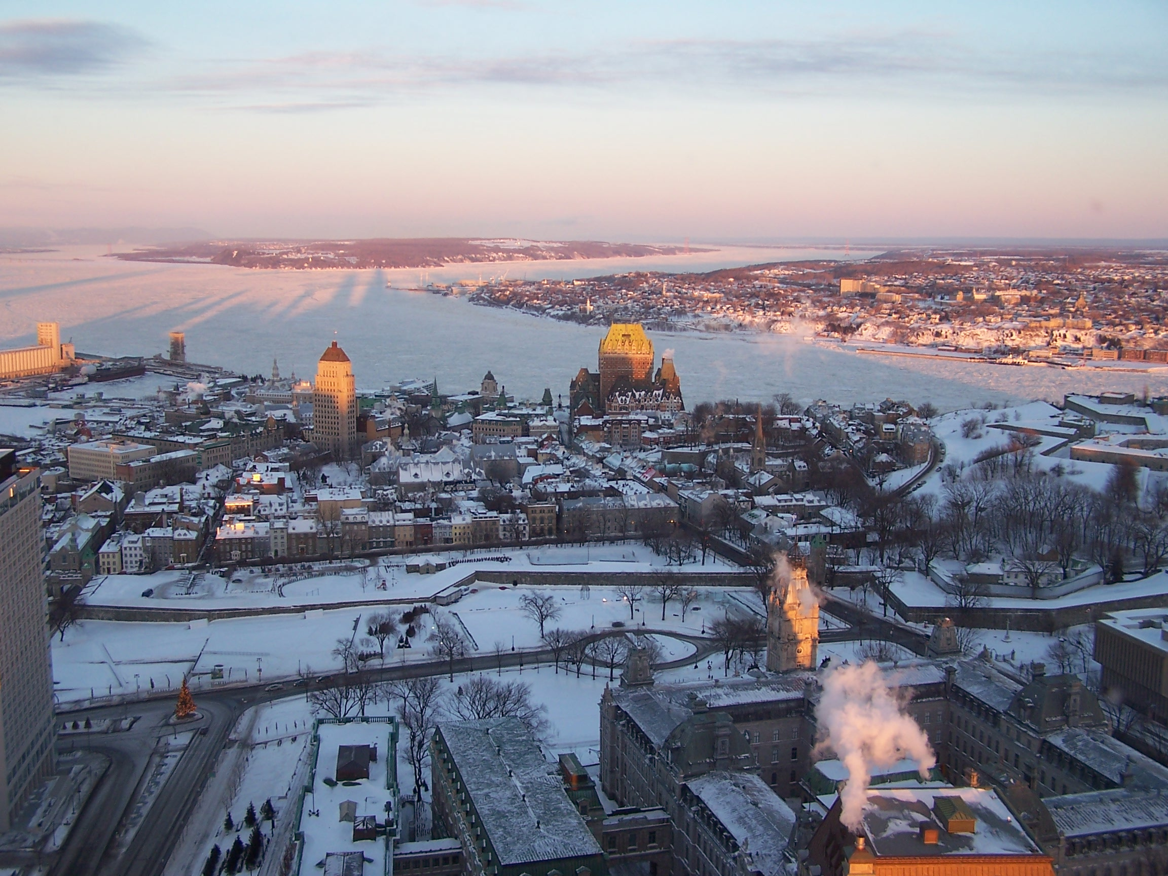 Vue à partir de l'observatoire de la Capitale. Vue vers l'est. Auteur:Stéphane Voyer